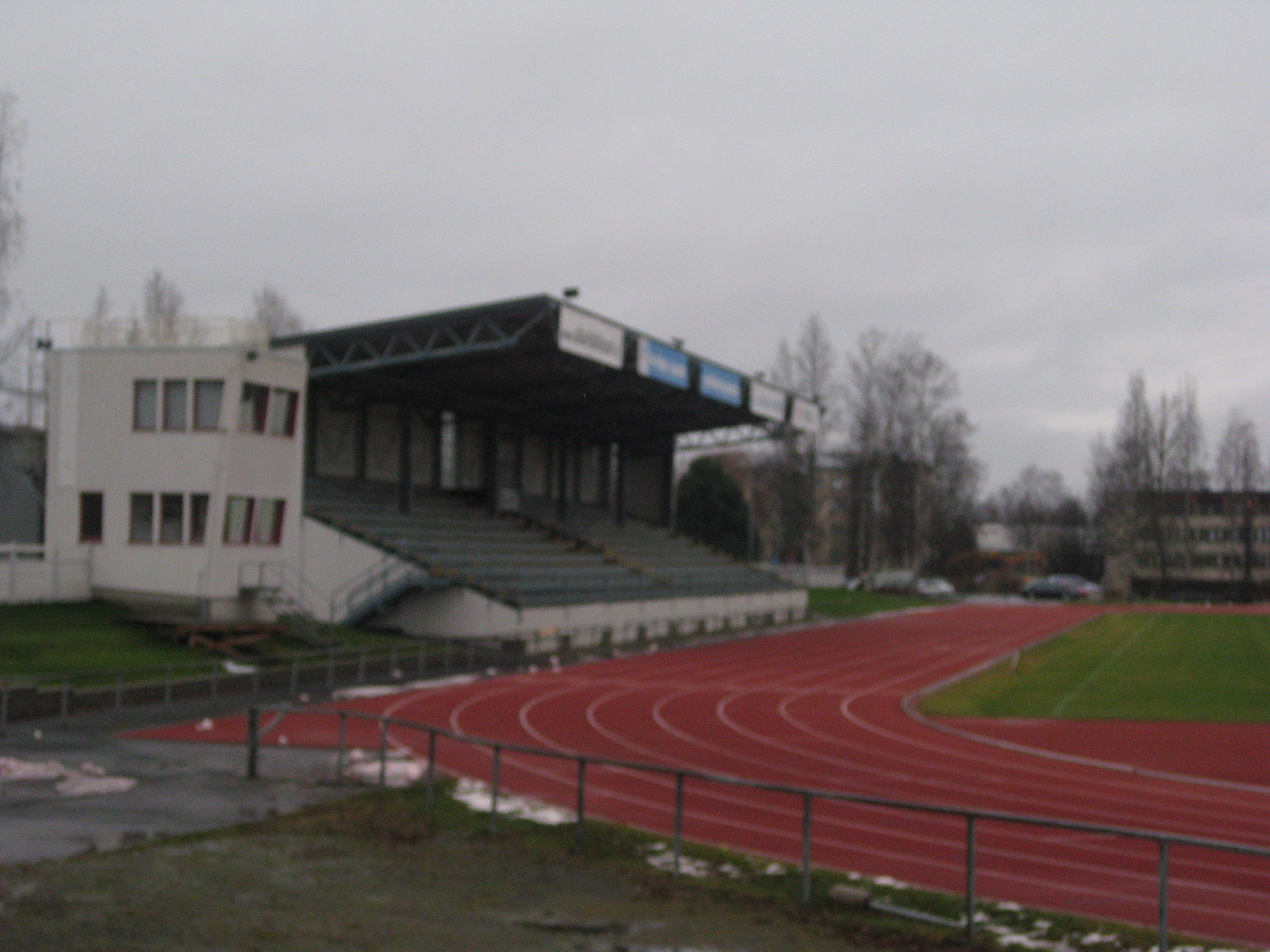 Lapuan keskuskentän katsomo